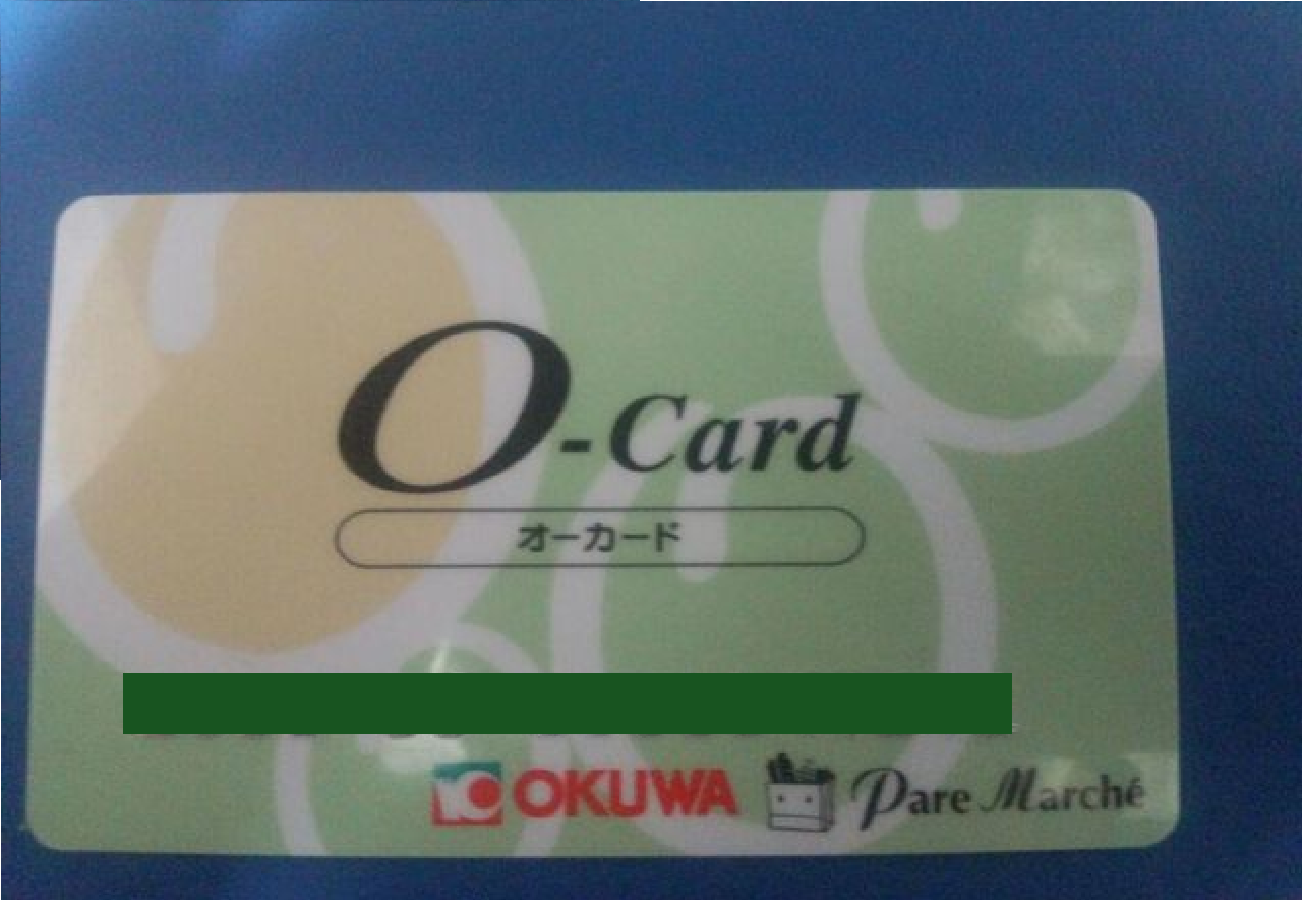 オークワのオーカード